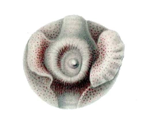 Spirula spirula